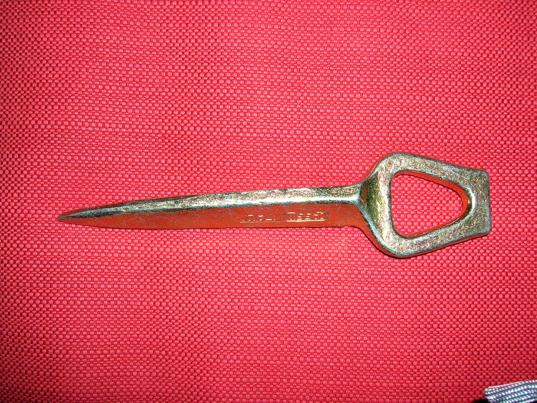 Foto di chiodo da roccia universale. Foto mia.